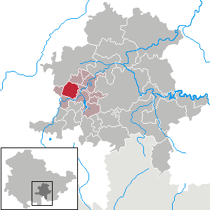 Oberhain in Thuringia - District Saalfeld-Rudolstadt